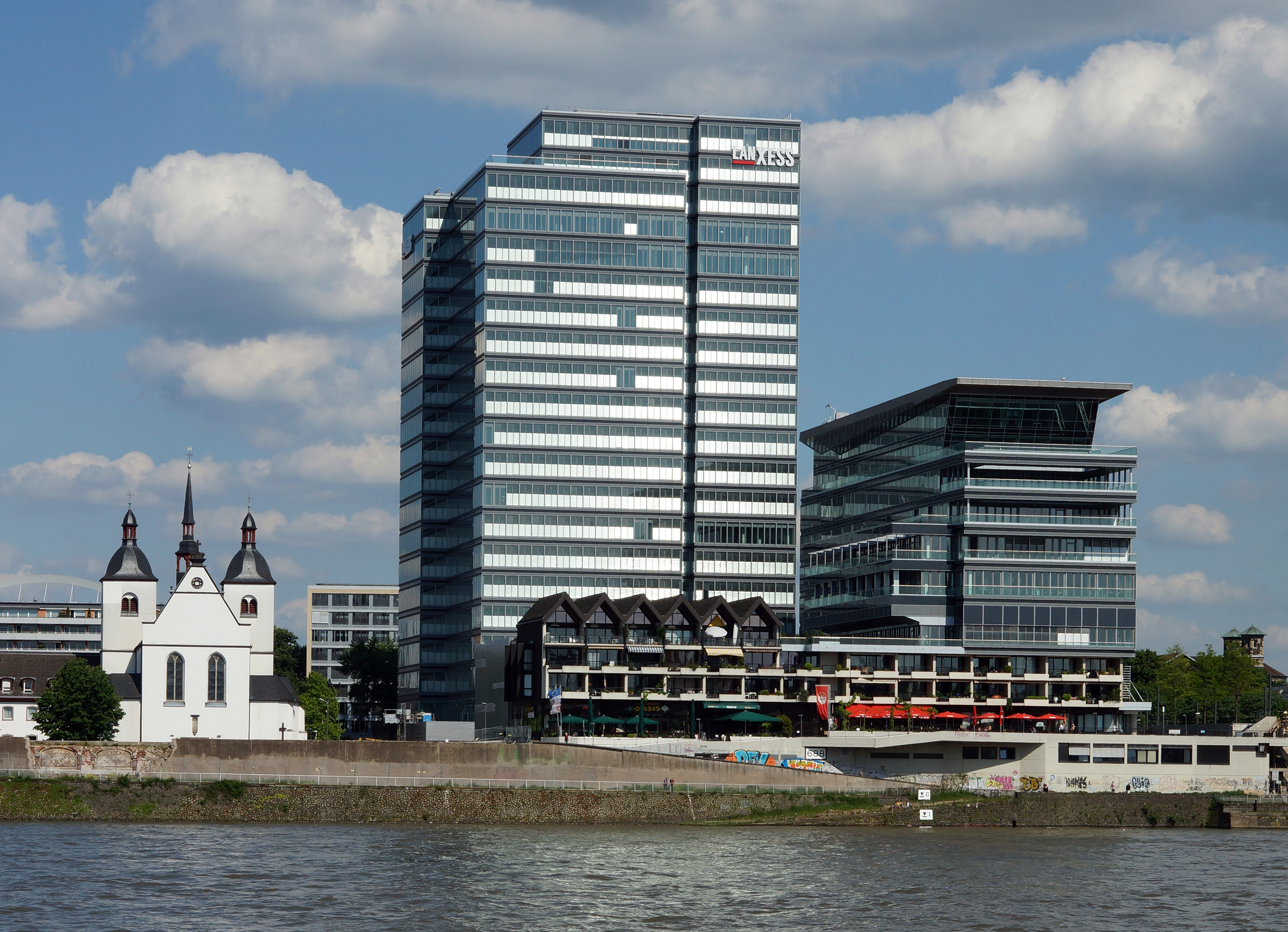 Das fast fertiggestellte MaxCologne in Köln-Deutz - jetzt mit Werbung für den Hauptmieter „Lanxess“